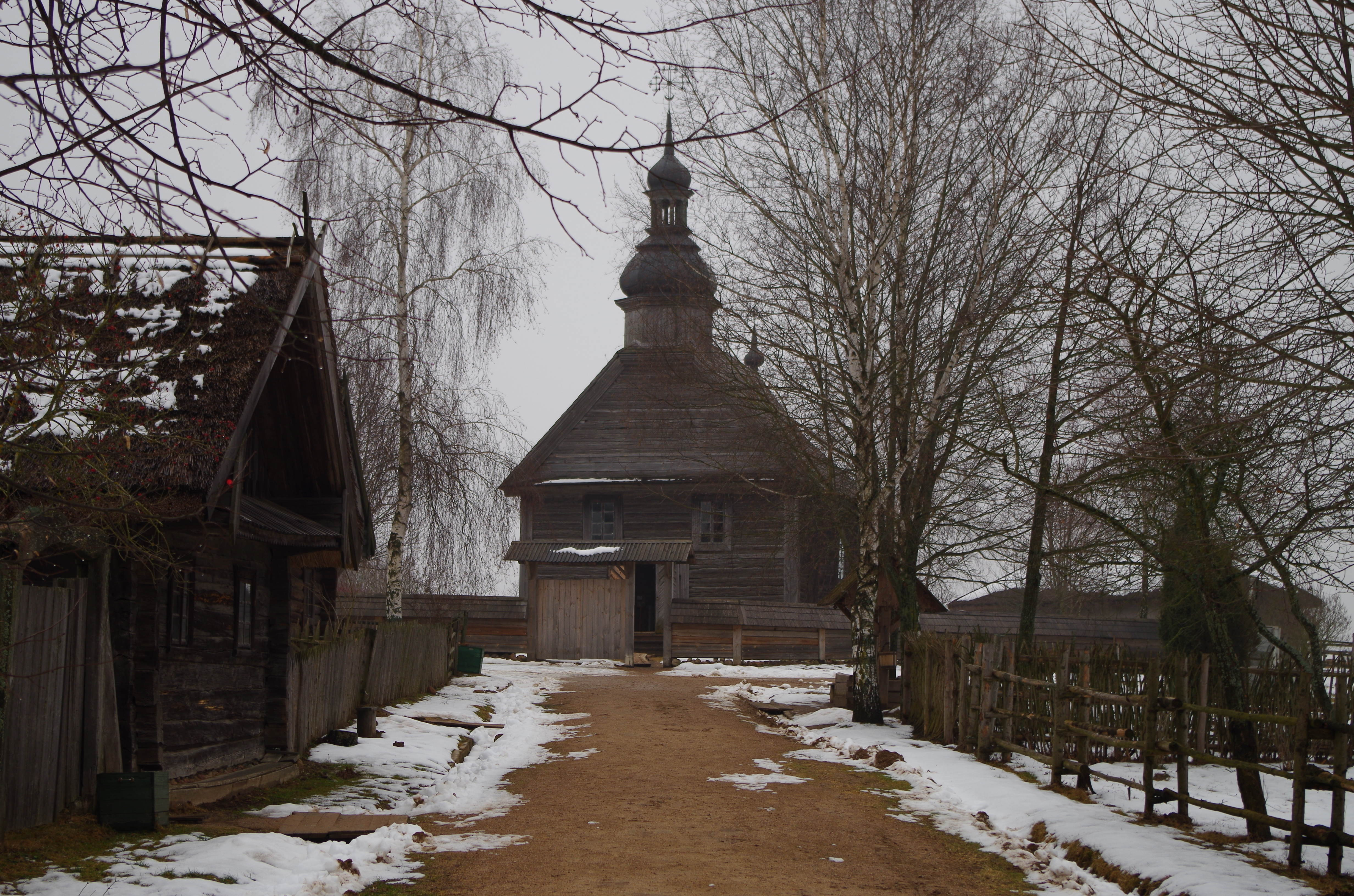 Minsk Region, Belarus